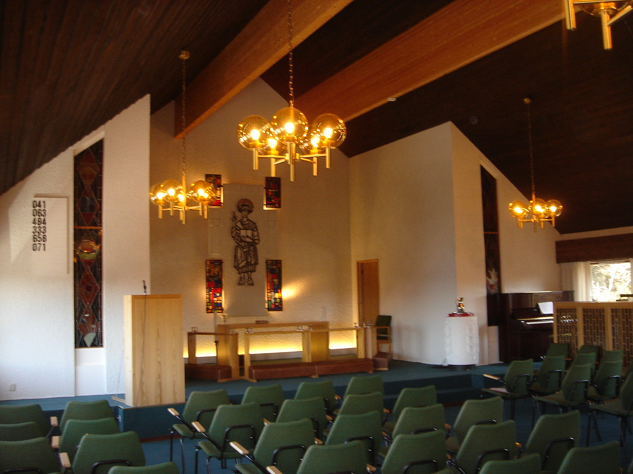 Vassøy kapell inne, Inside Vassøy Chapell (Stavanger, Norway)